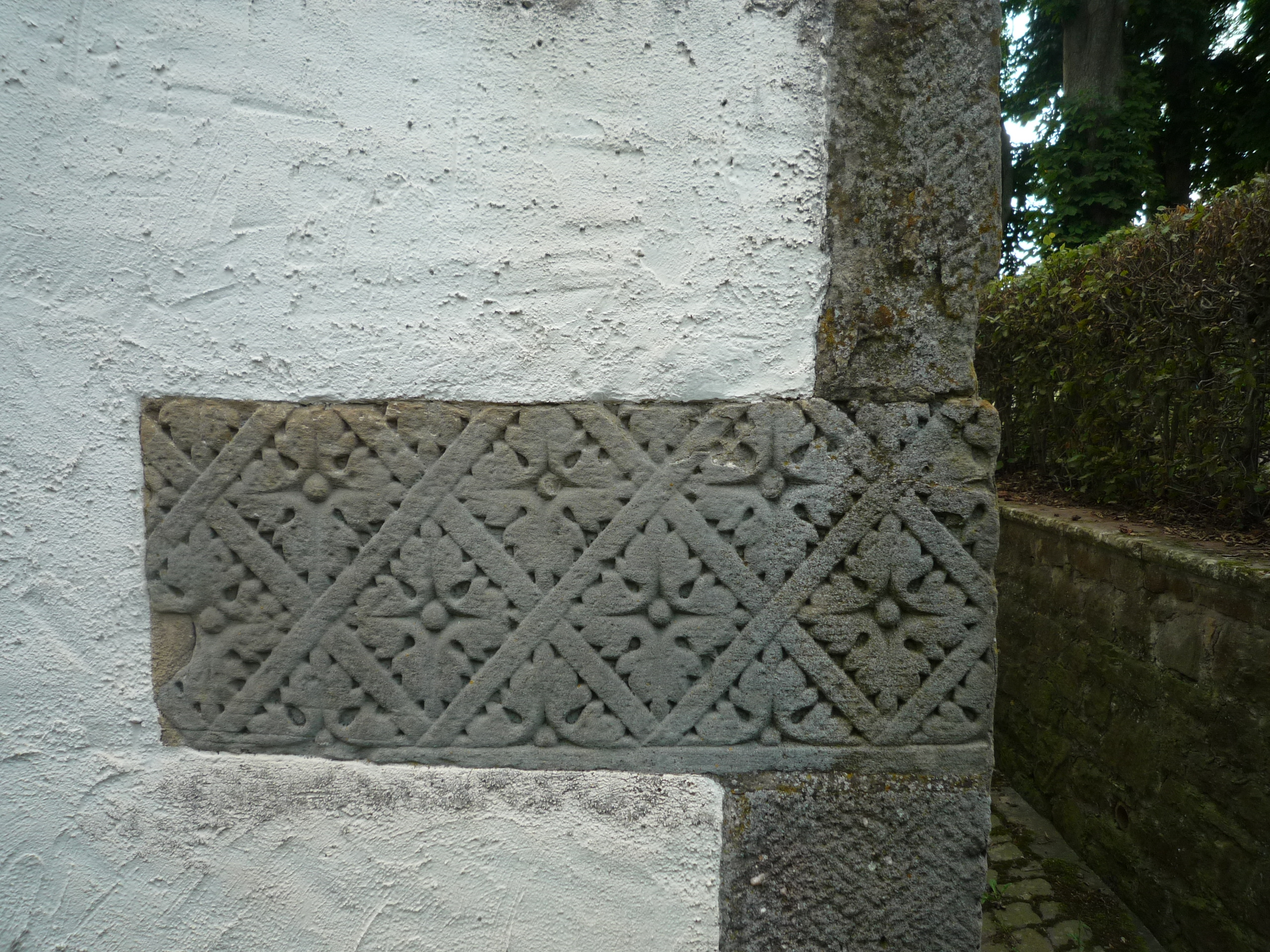 Quader mit Zierschlägen an der SW-Ecke der Hirsauer Kapelle